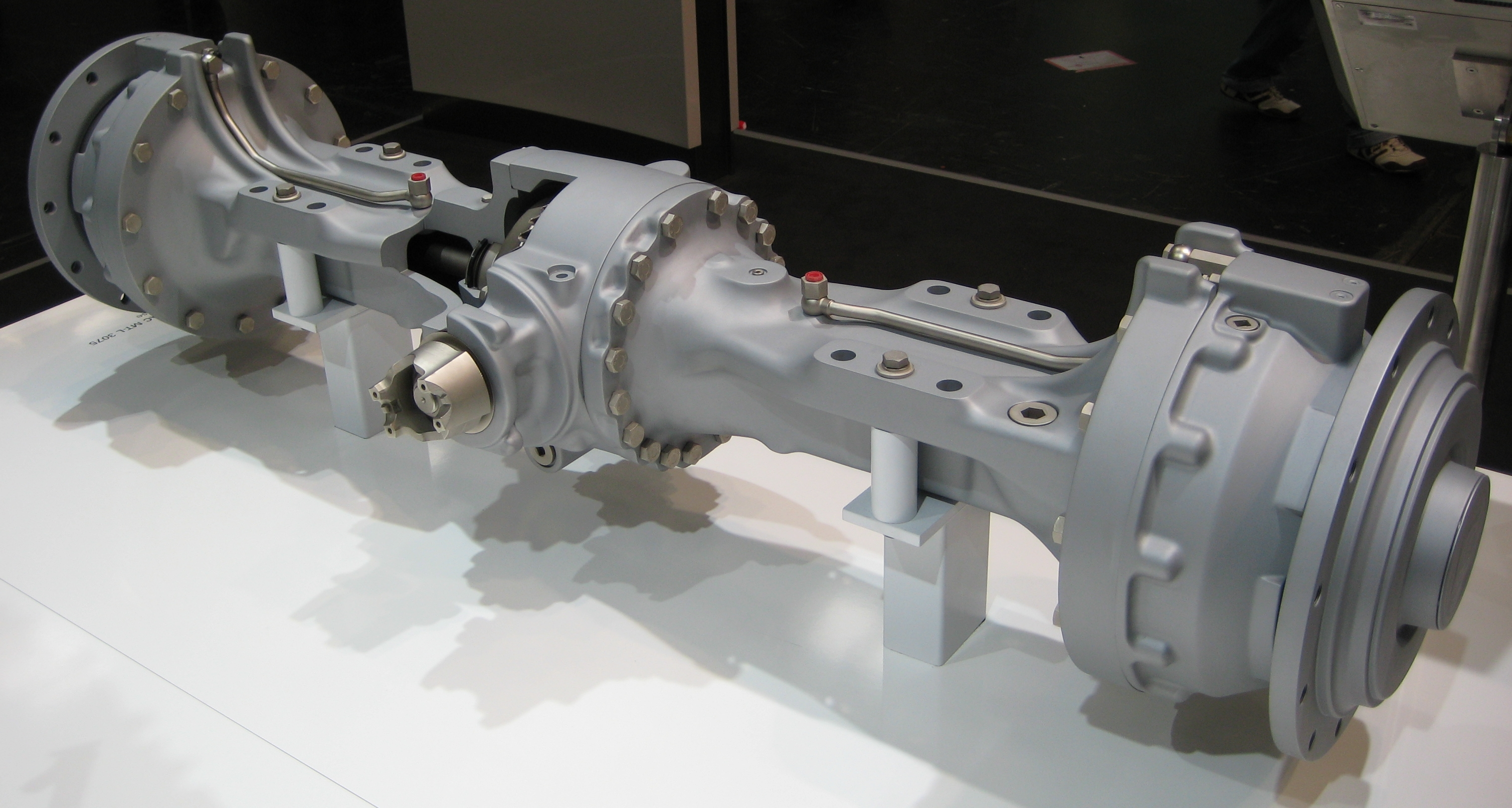 BAUMA 2007, ZF Lader-Achse MT-L3075